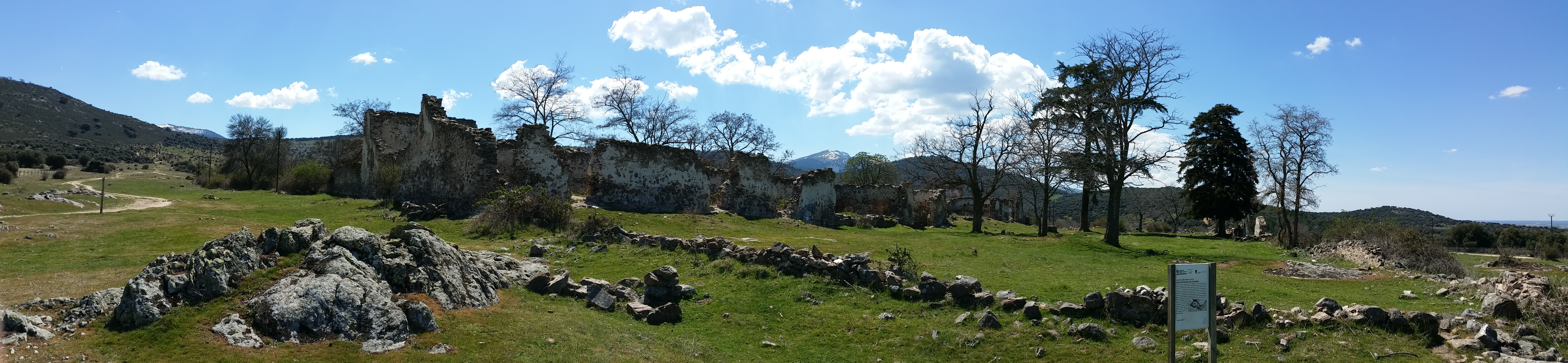 Casa de esquileo de Santillana, Segovia.